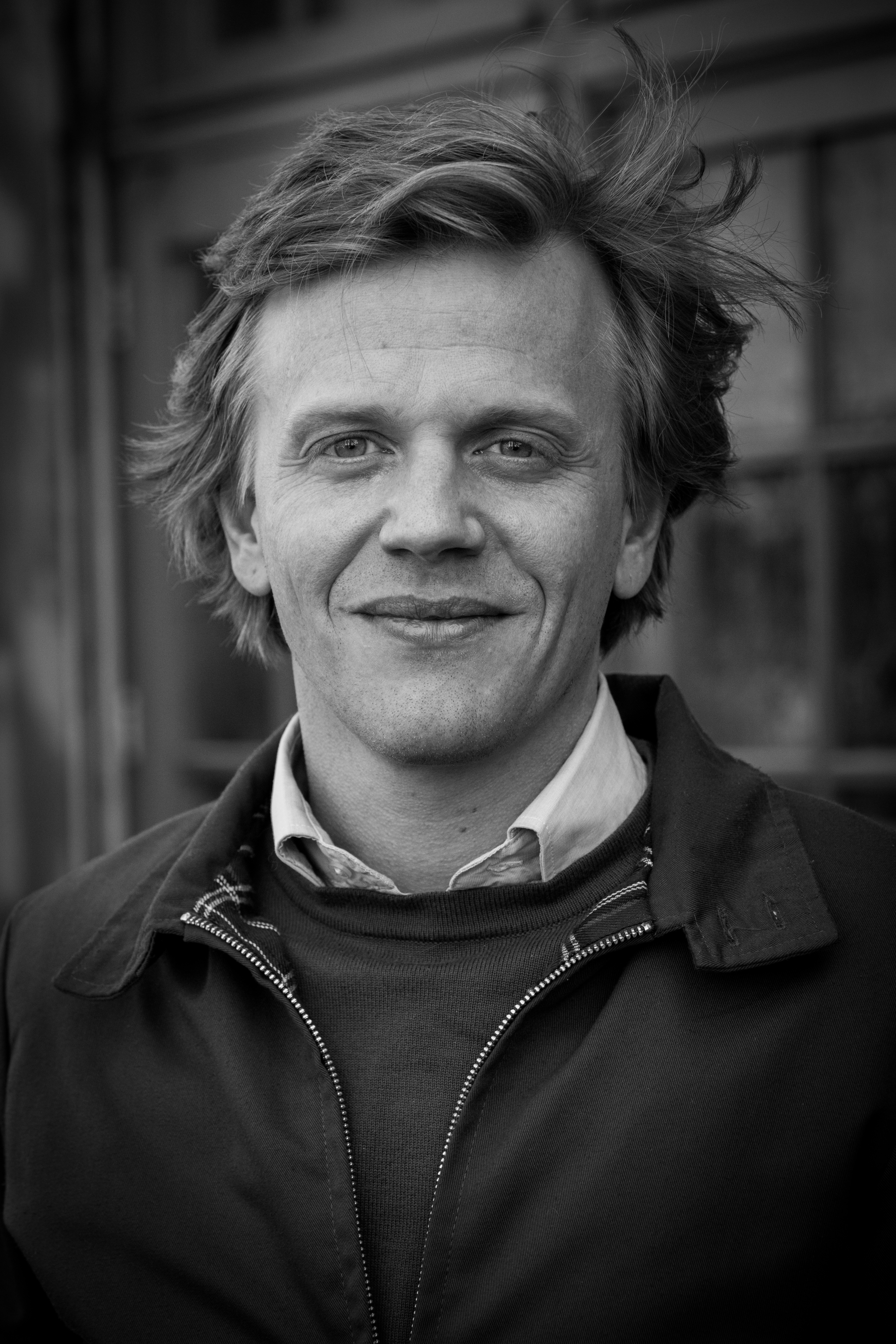 Alex Lutz, né le 24 août 1978 à Strasbourg, est un comédien, humoriste, metteur en scène et auteur de théâtre français.